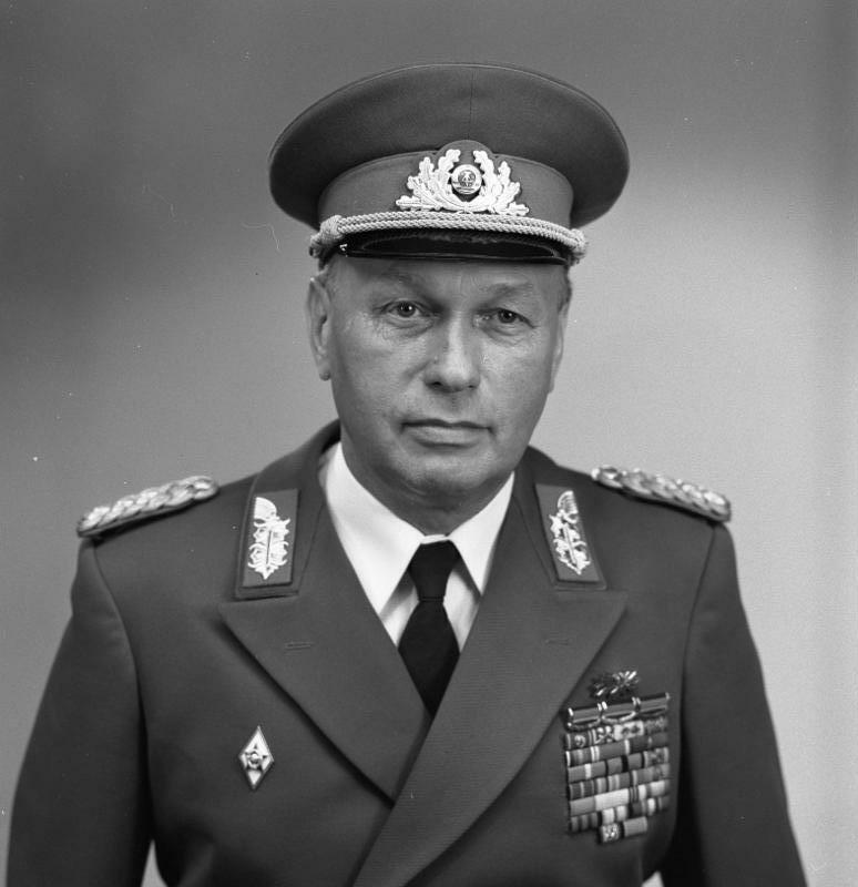 Fritz Streletz ADN-ZB/Brüggmann/12.2.82 [Herausgabedatum] Generaloberst Fritz Streletz, Stellvertreter des Ministers für Nationale Verteidigung der DDR und Chef des Hauptstabes. [Porträt Fritz Streletz] Abgebildete Personen: Streletz, Fritz: Generaloberst, stellvertretender Minister für Nationale Verteidigung, DDR (GND 123442362)